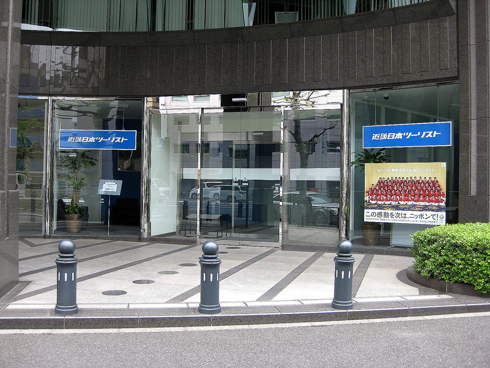 東神田フコク生命ビル1階 近畿日本ツーリスト受付入口 （東京都千代田区）